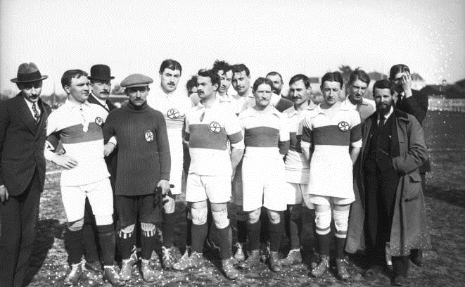 Équipe de l'Olympique lillois lors de la finale du Trophée de France 1914. Joueurs alignés : Carpentier (2e) - Degouve (3e), Jouvel - Gravelines (1er), Ducret (7e), Montagne - Vignoli (10e), Six (6e), Eloy, Chandelier (9e), Mollet.